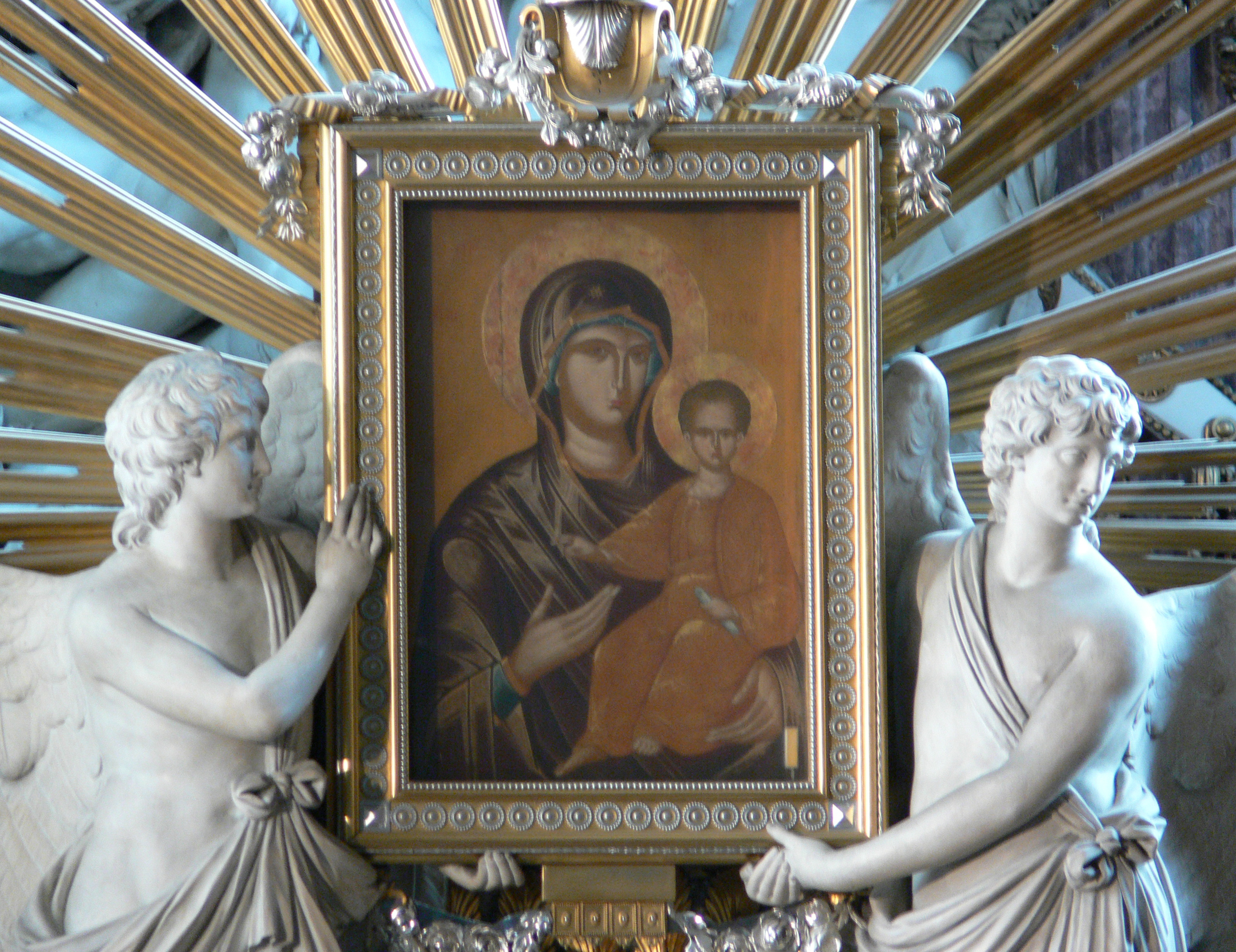 Wien, Michaelerkirche, Hochaltar